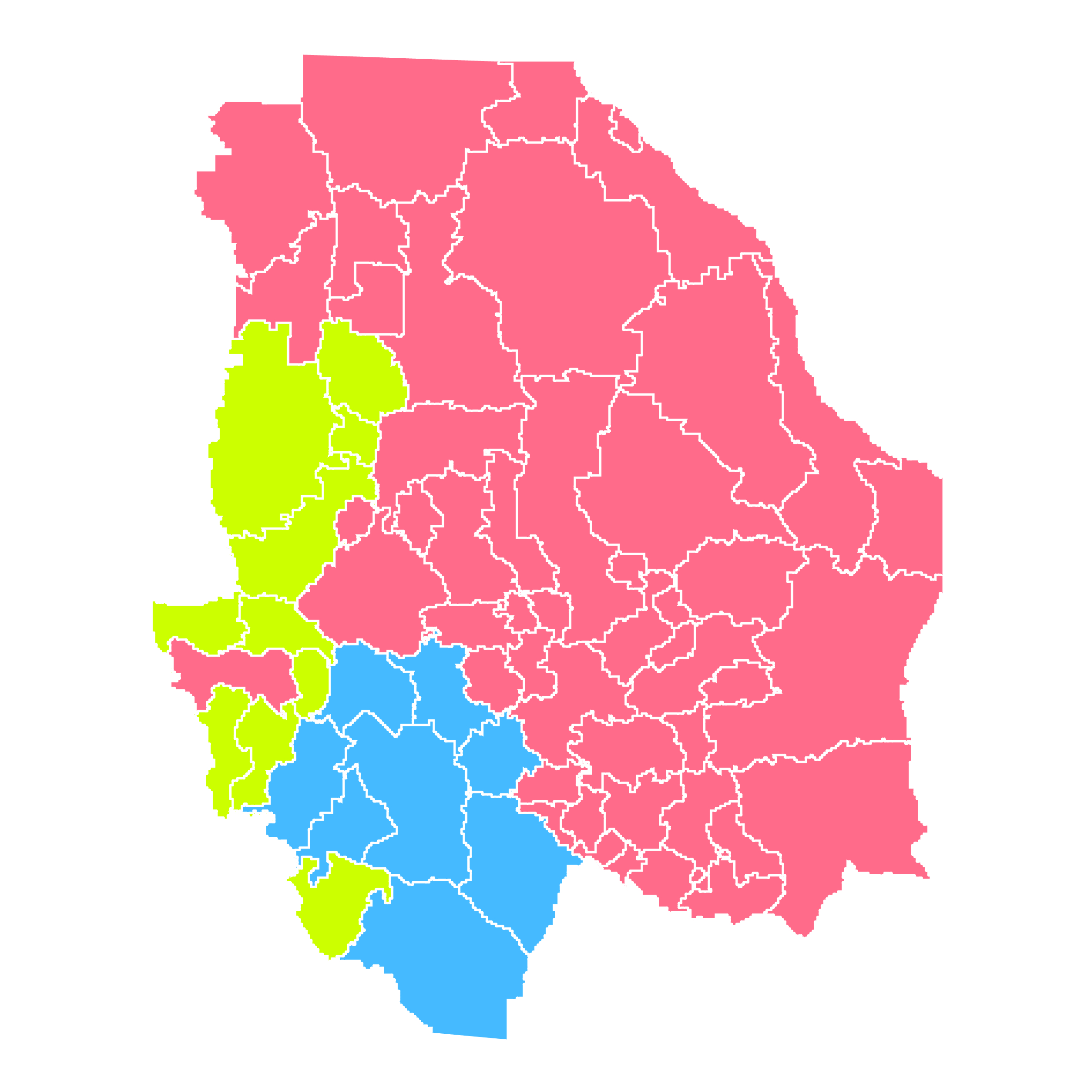 Tarahumara Ubicación